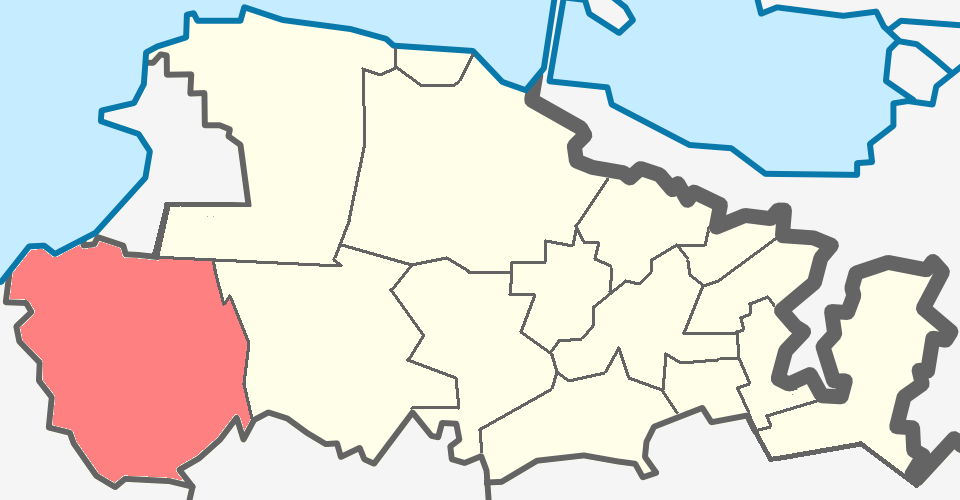 Копорское сельское поселение Ломоносовского района Ленинградской области.